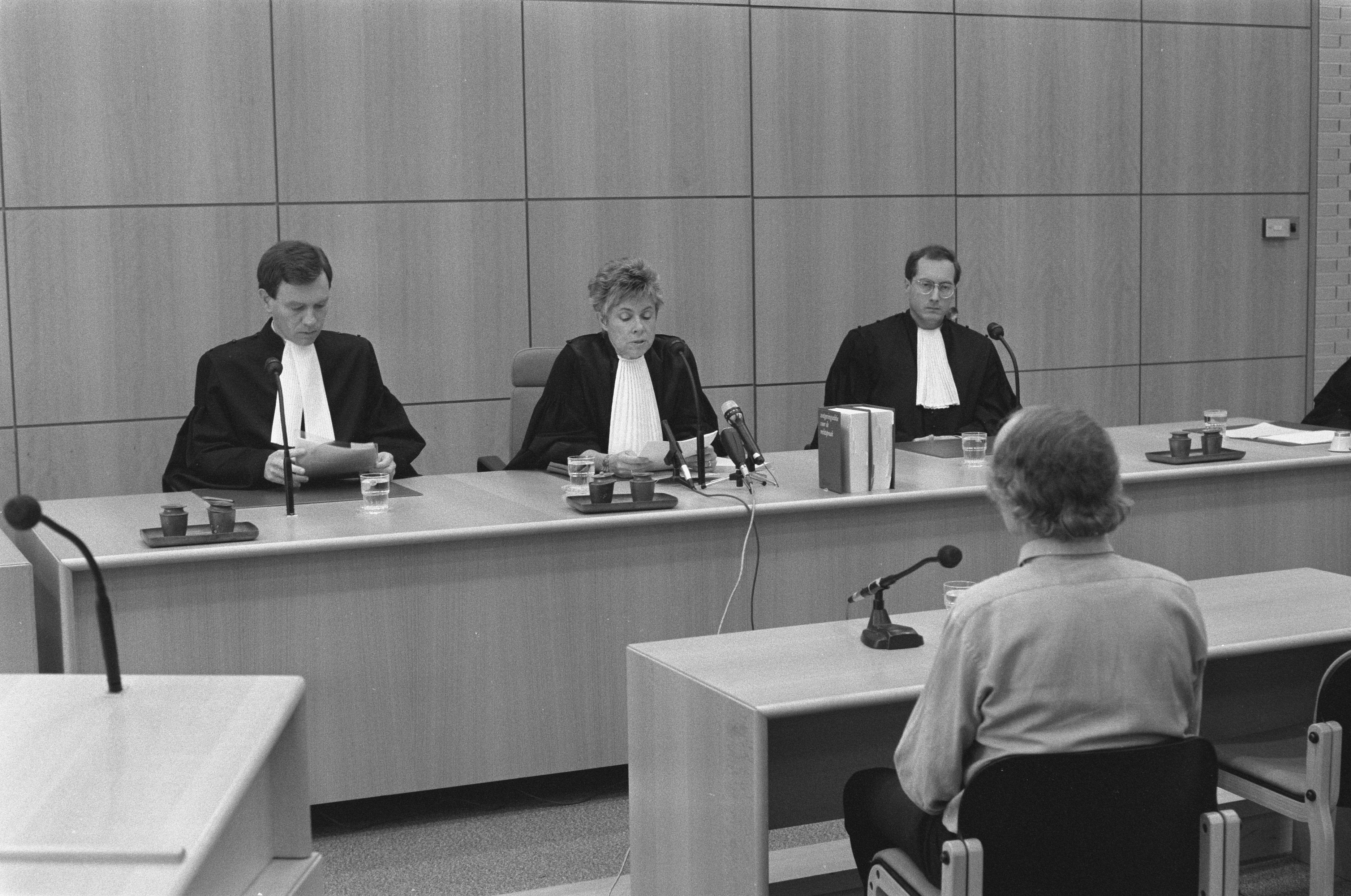 Collectie / Archief : Fotocollectie Anefo Reportage / Serie : [ onbekend ] Beschrijving : Rechtbank te Haarlem doet uitspraak in proces tegen Ferdi E. (Elsas), de ontvoerder van G.J. Heijn ; rechtbankpresident mevrouw mr. G.A. Terwee-van Hilten Datum : 14 juli 1988 Locatie : Haarlem, Noord-Holland Trefwoorden : processen, rechtbanken Persoonsnaam : Terwee-van Hilten, G.A. Fotograaf : Croes, Rob C. / Anefo Auteursrechthebbende : Nationaal Archief Materiaalsoort : Negatief (zwart/wit) Nummer archiefinventaris : bekijk toegang 2.24.01.05 Bestanddeelnummer : 934-2865